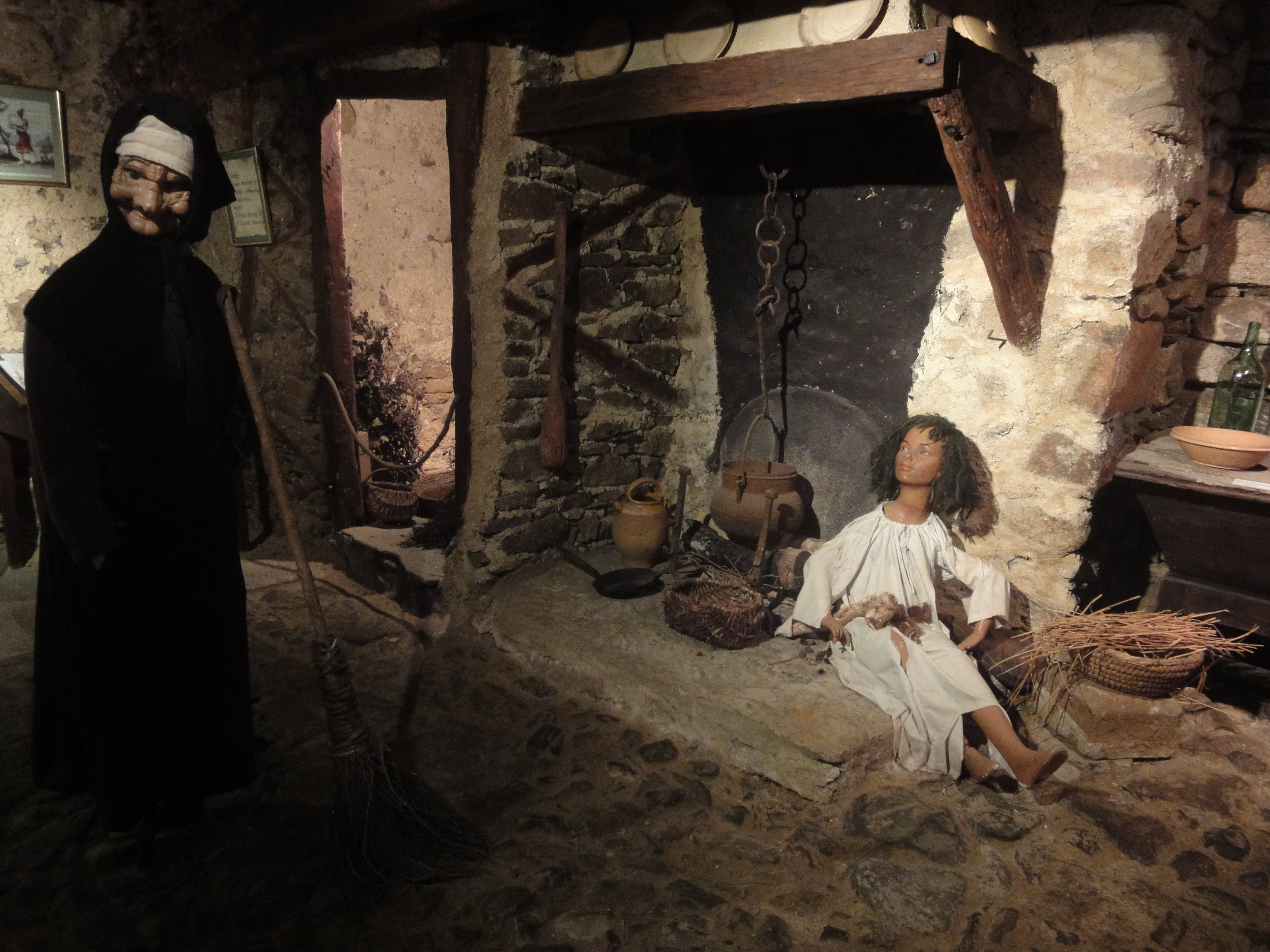 Lacaune (Tarn) - musée du vieux Lacaune : Victor, l'enfant sauvage